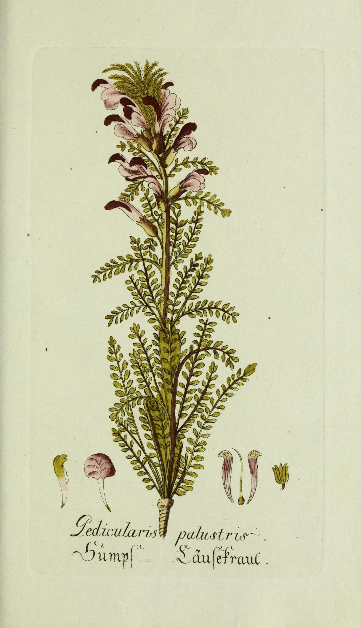 Plantarum indigenarum et exoticarum icones ad vivum coloratae, oder, Sammlung nach der Natur gemalter Abbildungen inn- und ausländlischer Pflanzen, für Liebhaber und Beflissene der Botanik /